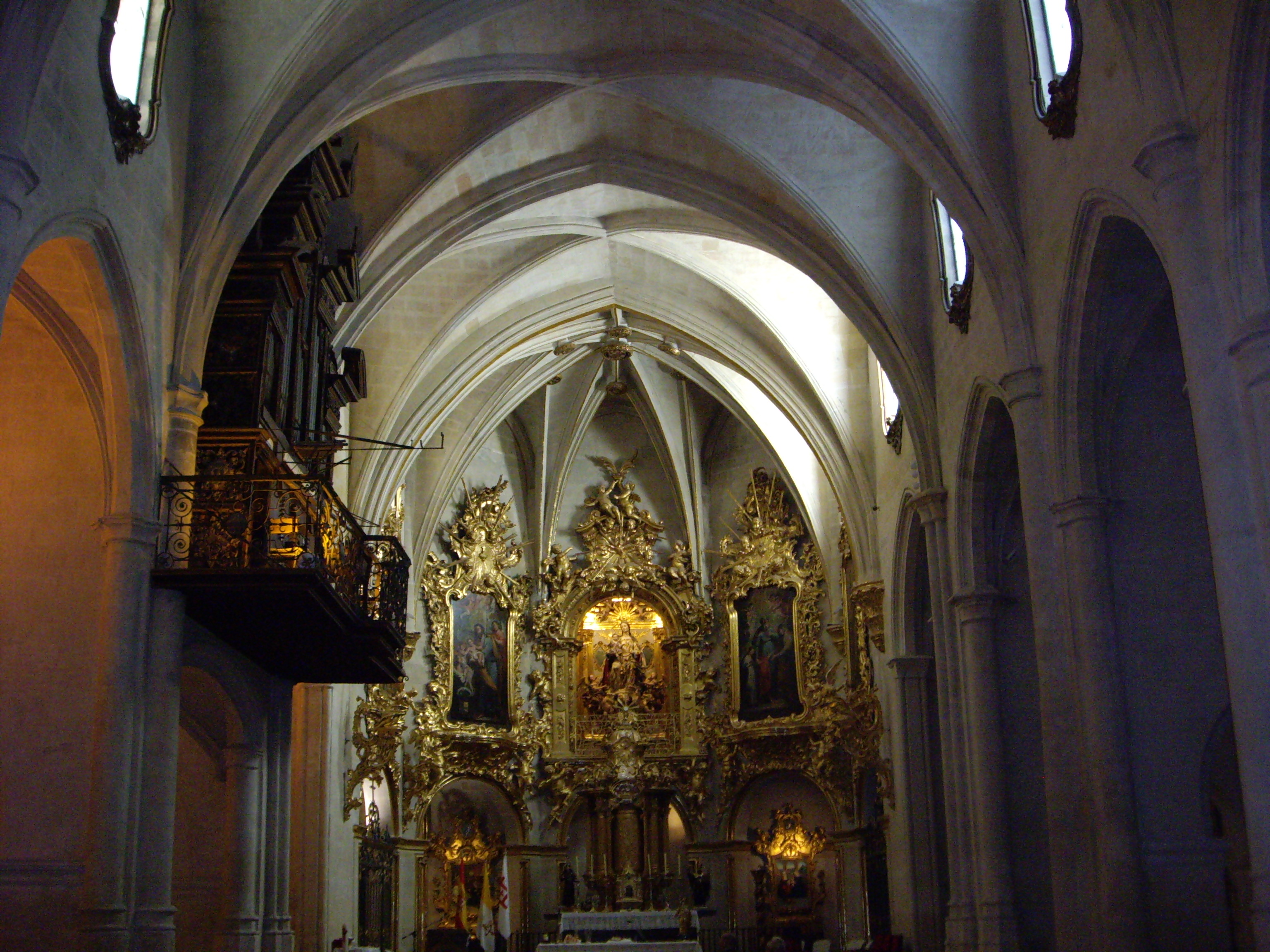 Església de Santa Maria, Alacant. Interior.